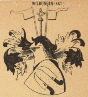 Wappen der althessischen Adelsfamilie von Windungen (extict 1822)